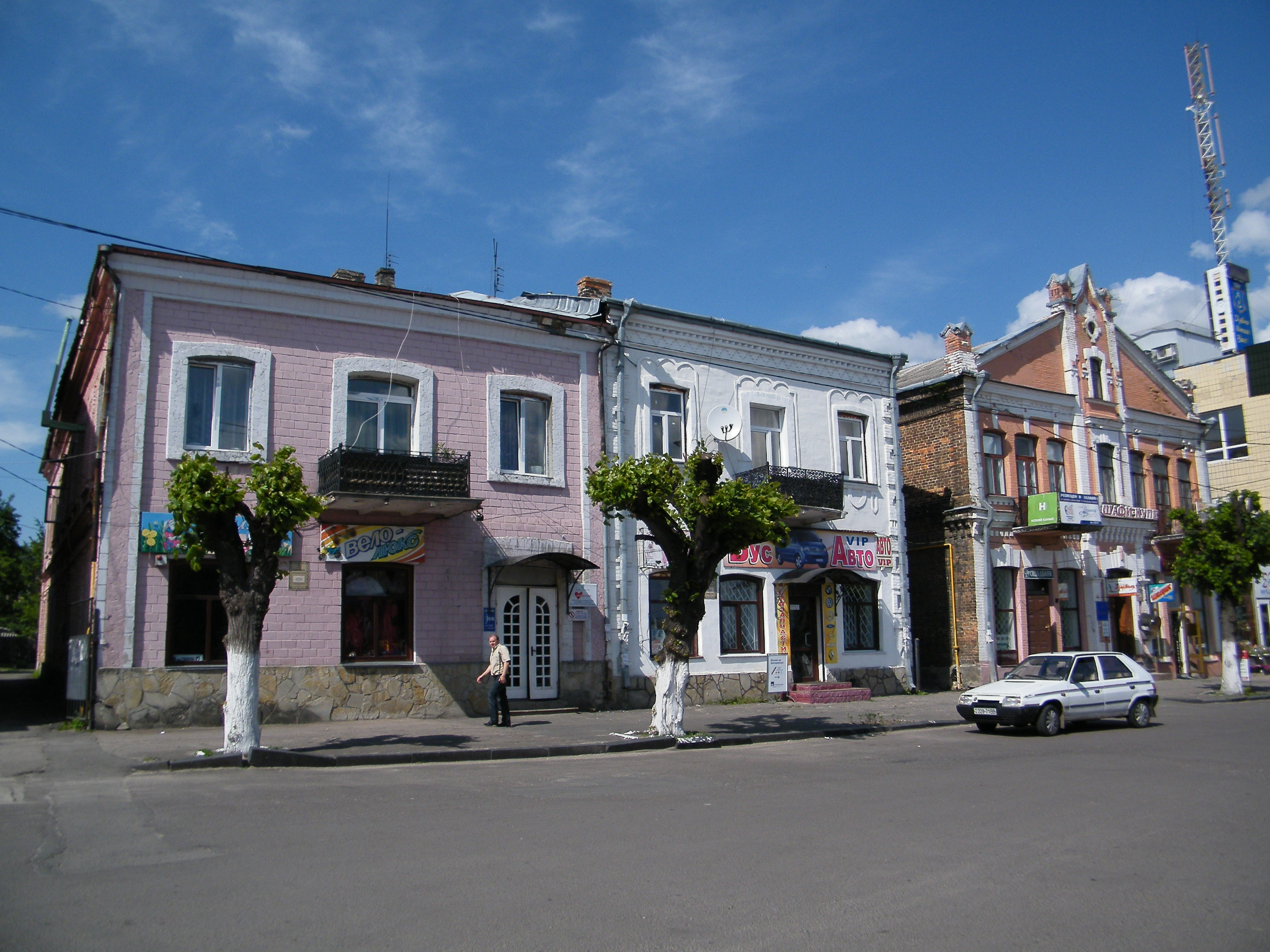 Дубно.Центр города